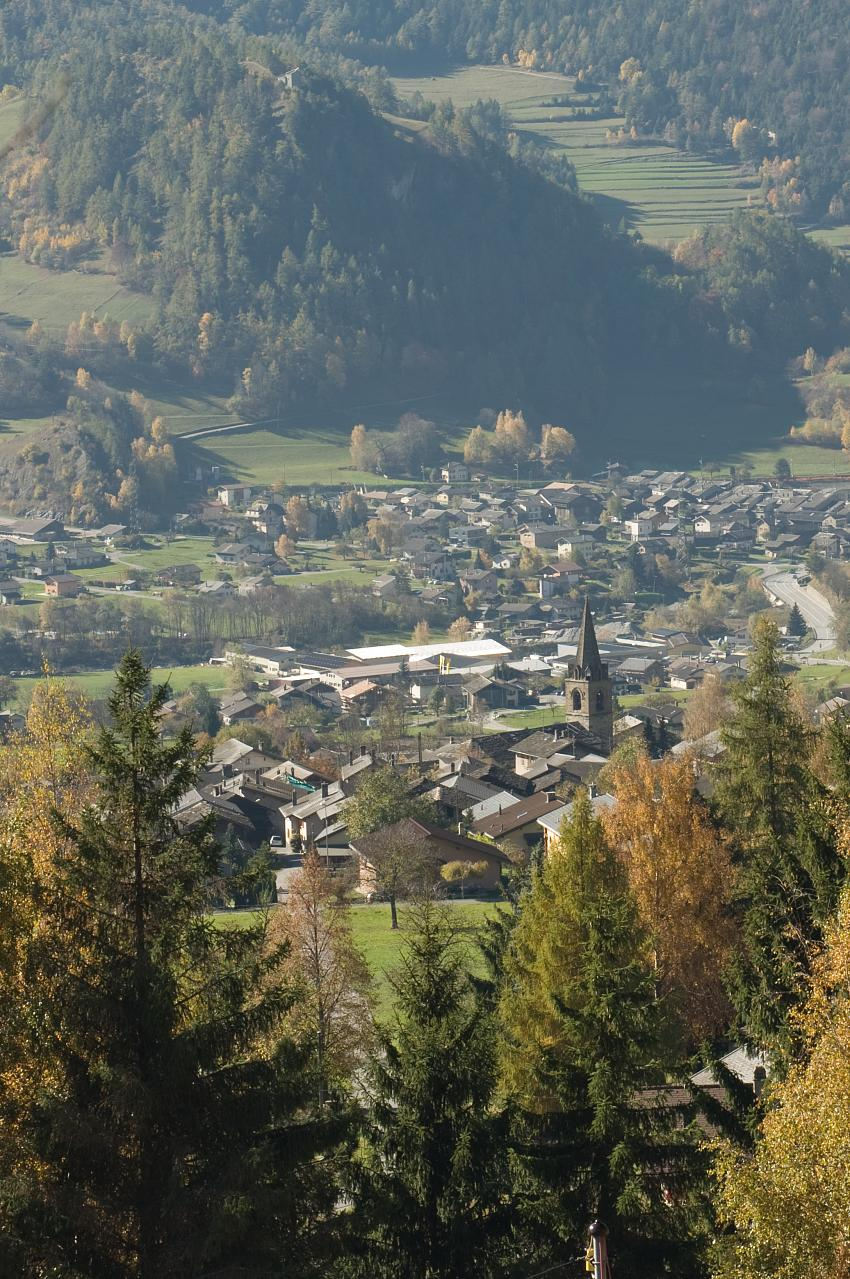 Vue de la commune de Vollèges, Valais, Suisse